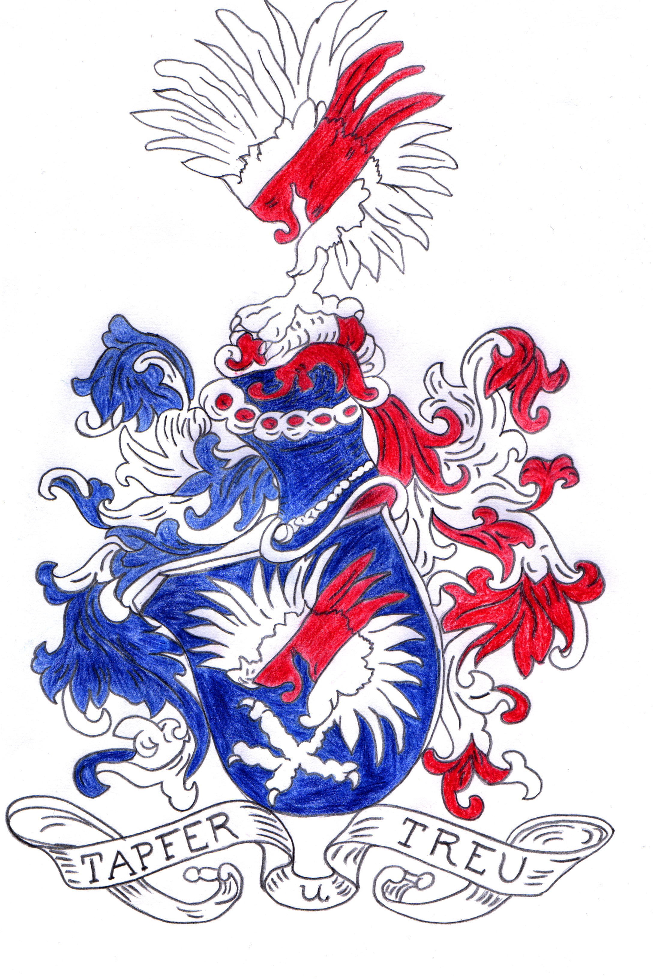 Wappen des brandenburgisch-lausitzer-ostpreußischen Stammes